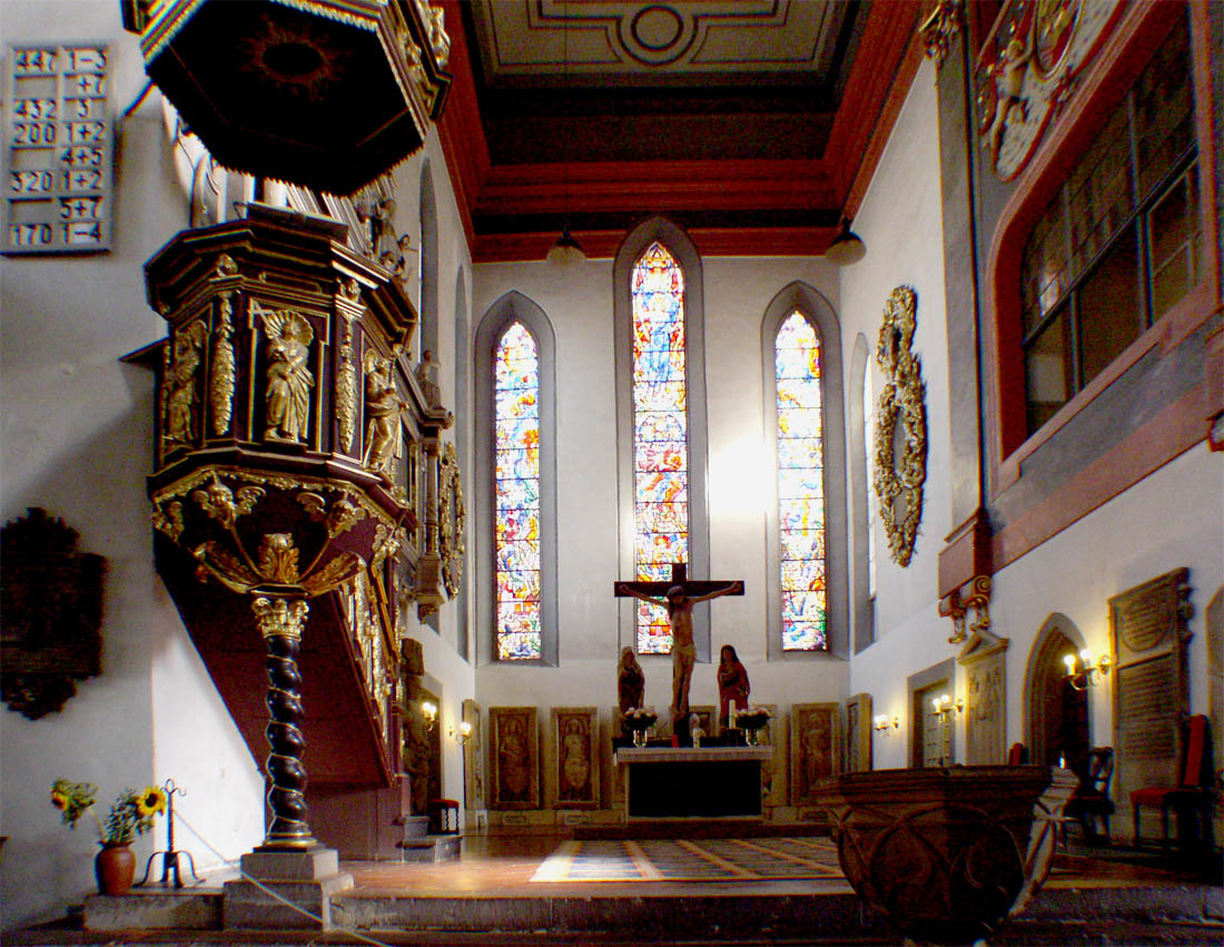 Innenansicht Georgenkirche Eisenach